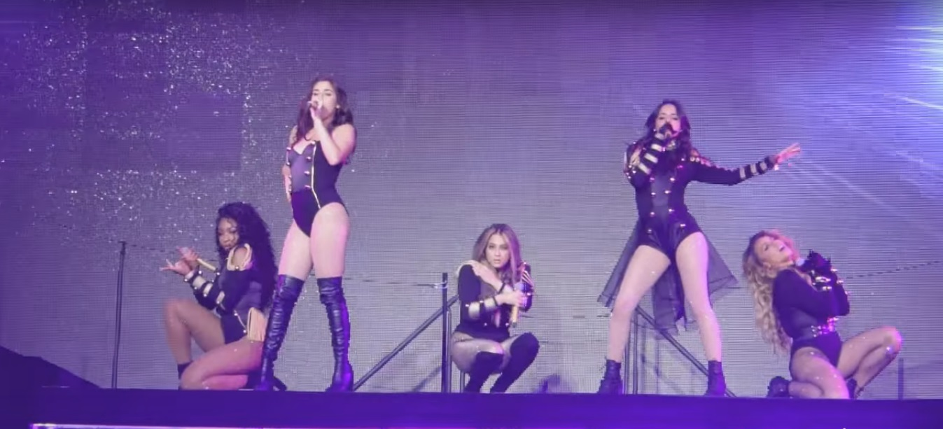 Fifth Harmony July 30th 2016 Mohegan Sun Arena Uncasville, CT